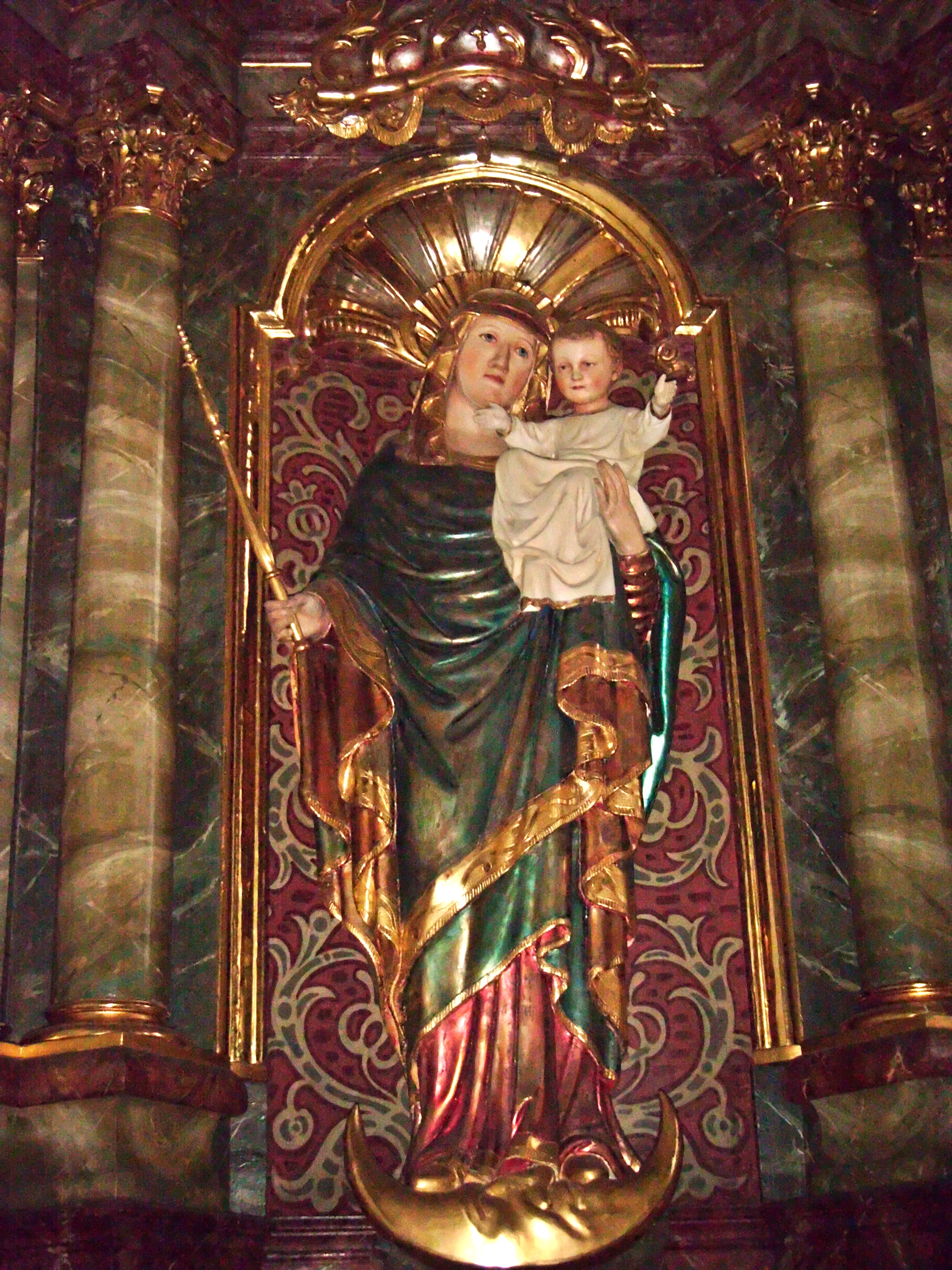 Madonna im Kloster St. Magdalena Speyer, geschaffen von Peter Anton Linck (1743-1824), im Auftrag des Domkapitulars Karl Joseph von Mirbach (1718-1798)